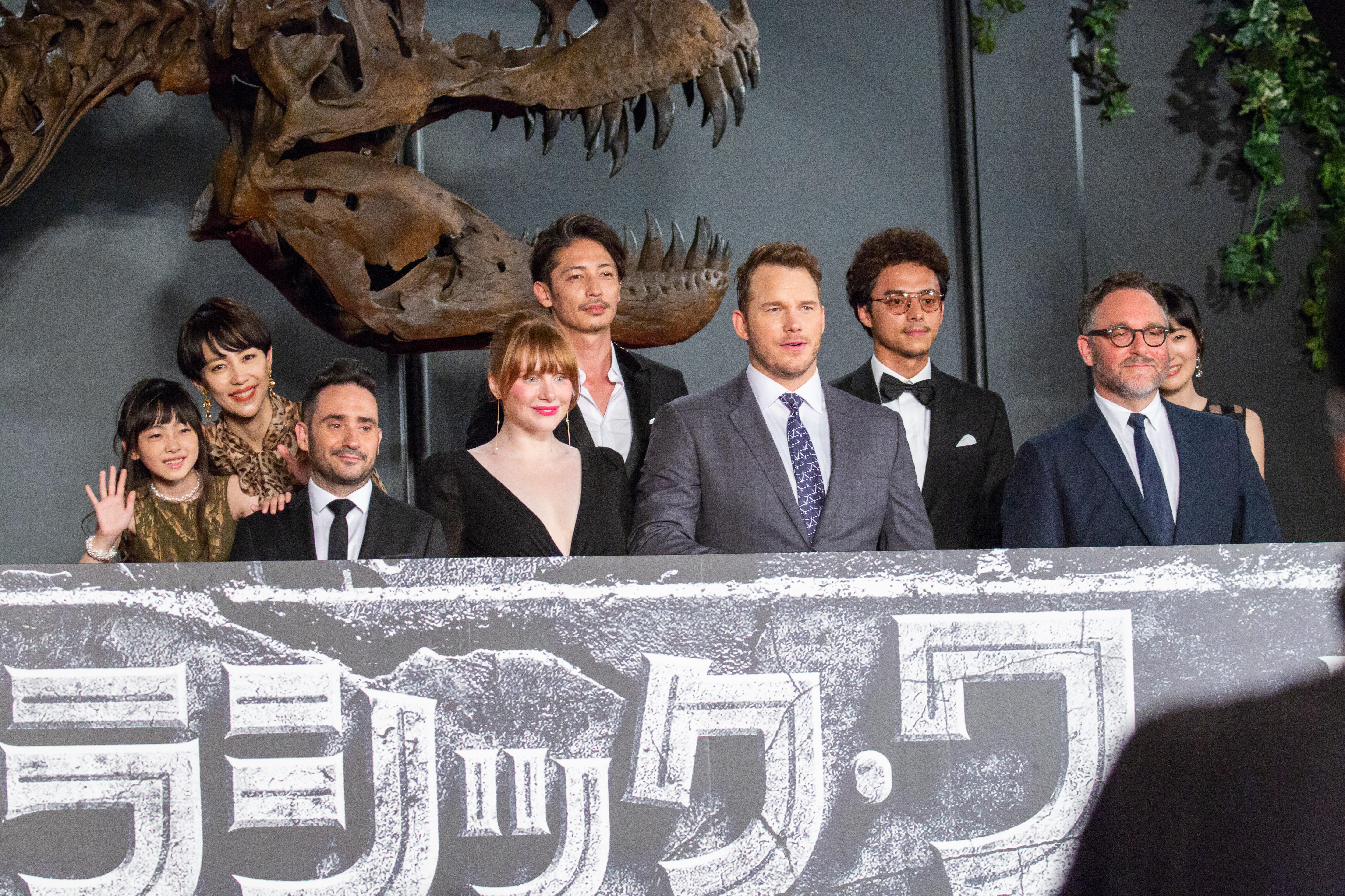 ジュラシック・ワールド/炎の王国 ジャパン・プレミア レッドカーペット J・A・バヨナ コリン・トレヴォロウ クリス・プラット ブライス・ダラス・ハワード 玉木宏 木村佳乃 満島真之介 石川由依 住田萌乃